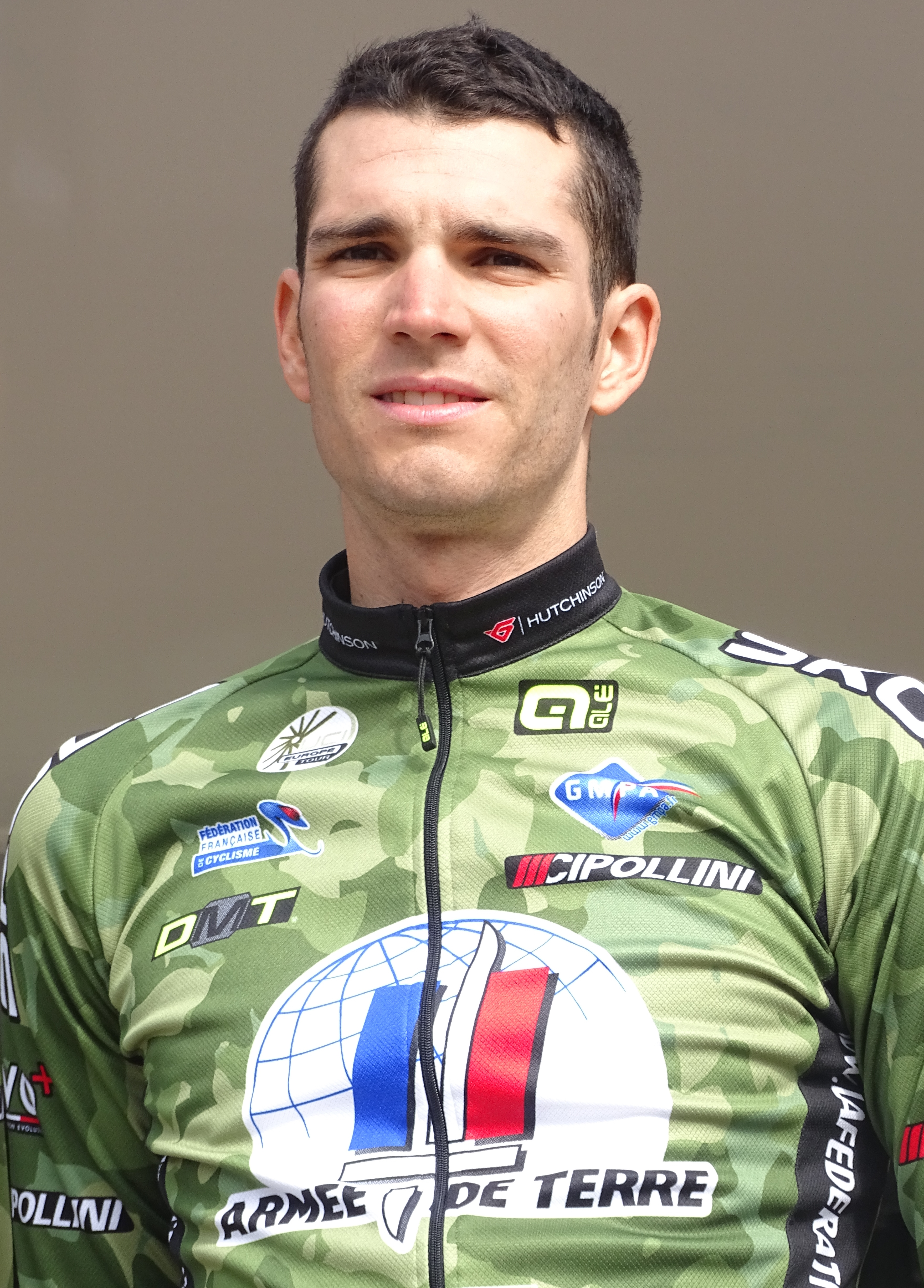 Reportage réalisé le jeudi 16 avril à l'occasion du départ et de l'arrivée du Grand Prix de Denain 2015 à Denain, Nord, Nord-Pas-de-Calais, France.